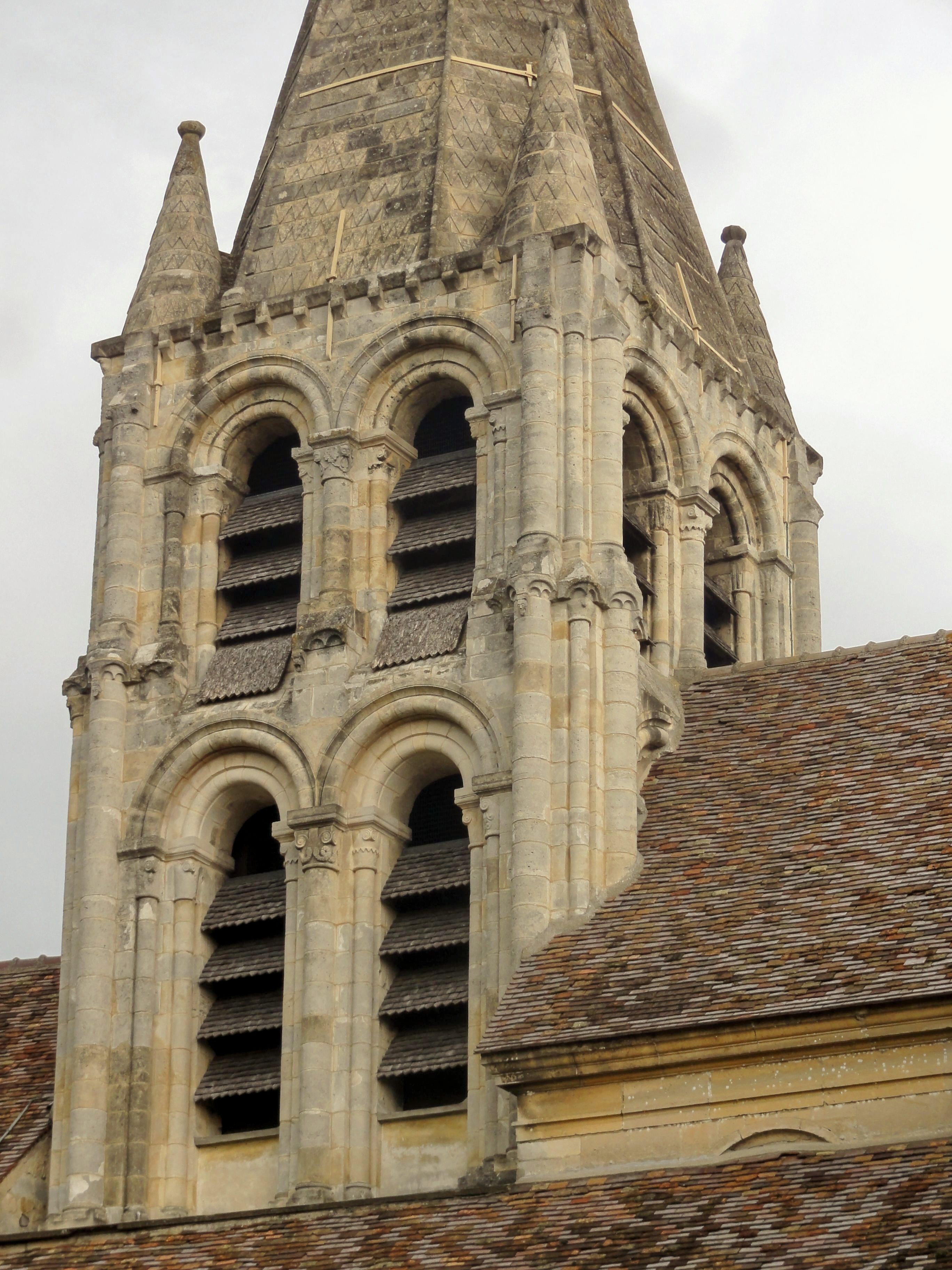 Clocher.